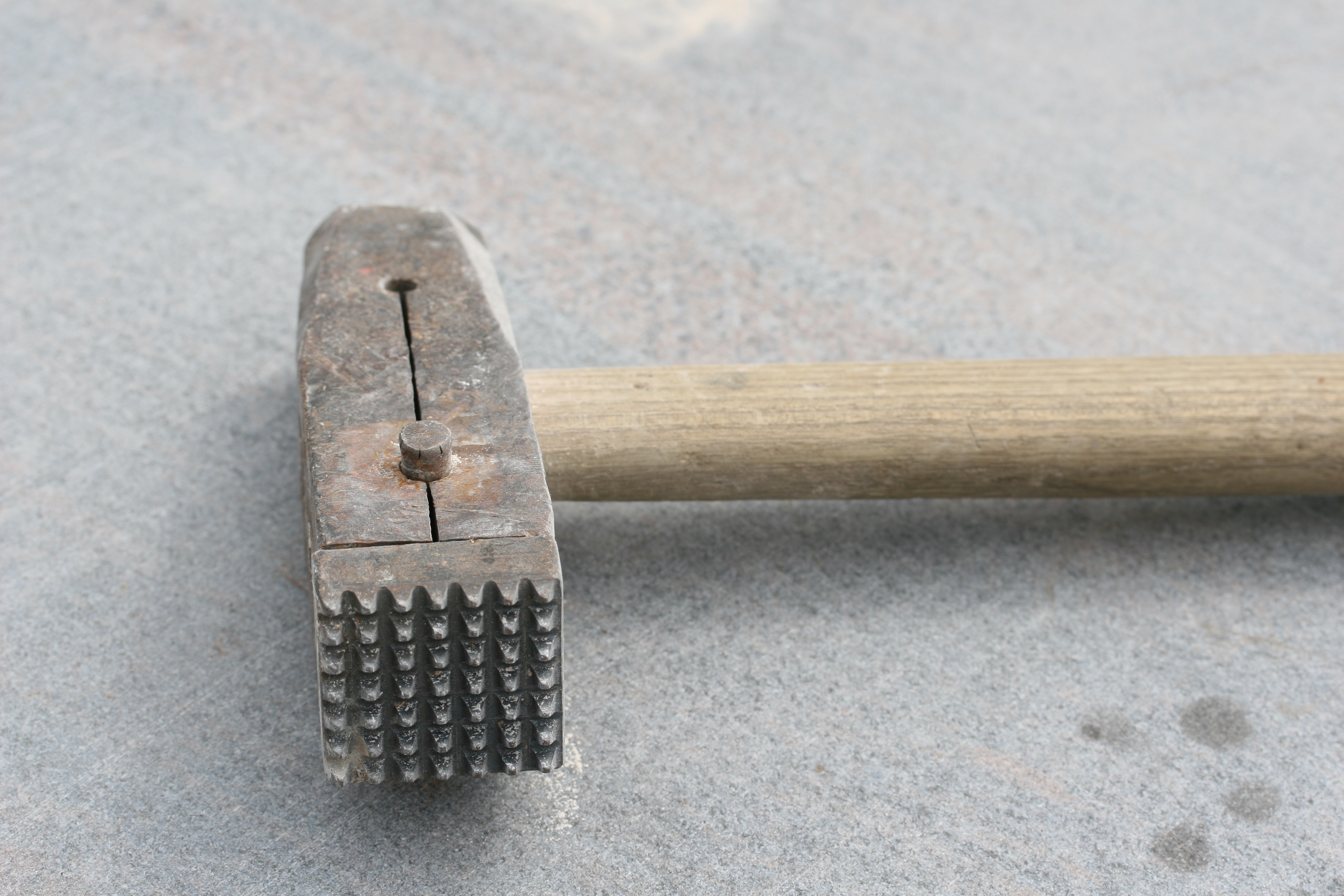 Stockhammer